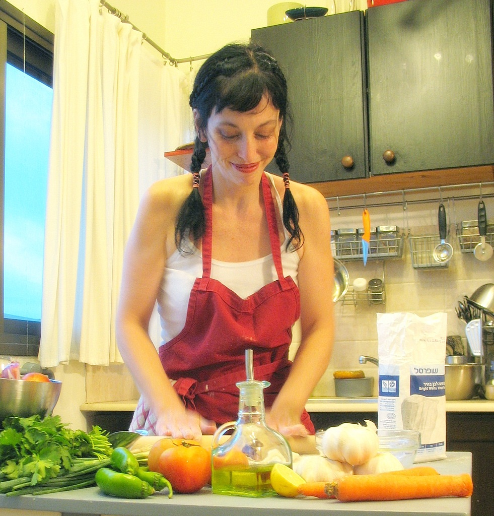 דנה מלמד